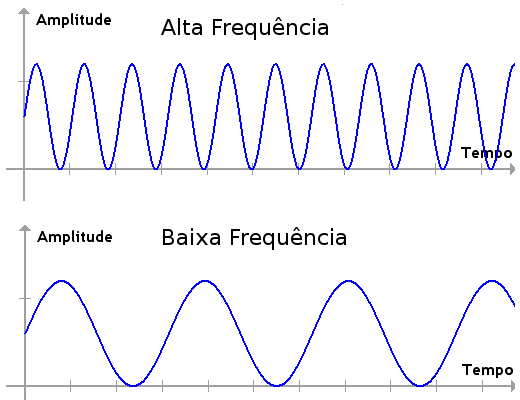 Esquema representando frequências de som diferentes. Criado para substituir Frecuencia.png This PNG graphic was created with GIMP.